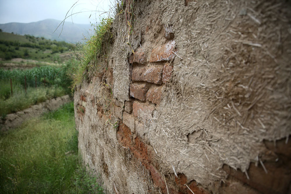 دیوار بزرگ اسکندر یا دیوار سرخ که در متون قدیمی با نام مار سرخ نیز نامیده‌شده‌است ، دیواری تاریخی است که از کنار دریای خزر در ناحیه گمیشان آغاز شده و تا کوه‌های گلیداغ در شمال شرق کلاله ادامه می‌یافته‌است. هم‌اکنون تقریباً تمام این دیوار از میان رفته‌است و تنها بخش‌های کوچکی از آن که در زیر خاک مدفون مانده، باقی است. دیوار تاریخی گرگان پس از دیوار چین (به طول شش هزار کیلومتر) ، بزرگترین دیوار دفاعی جهان است. این دیوار عظیم تاریخی که ۲۰۰ کیلومتر طول دارد در ۲۹ تیرماه سال ۱۳۷۸ به ثبت ملی رسیده‌است.